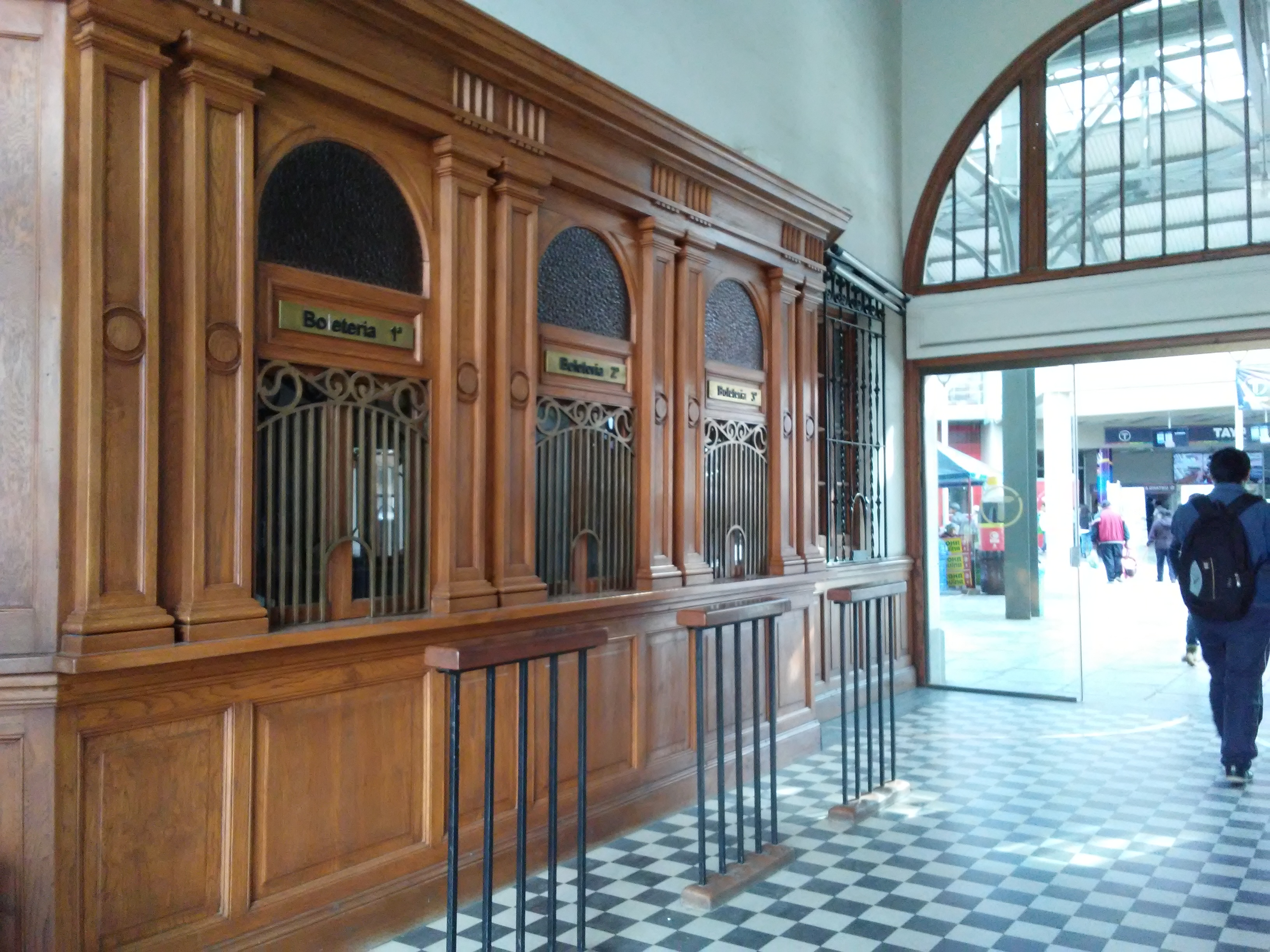 Estación ENFE This medium shows the protected monument with the number L/00-001 in Bolivia.